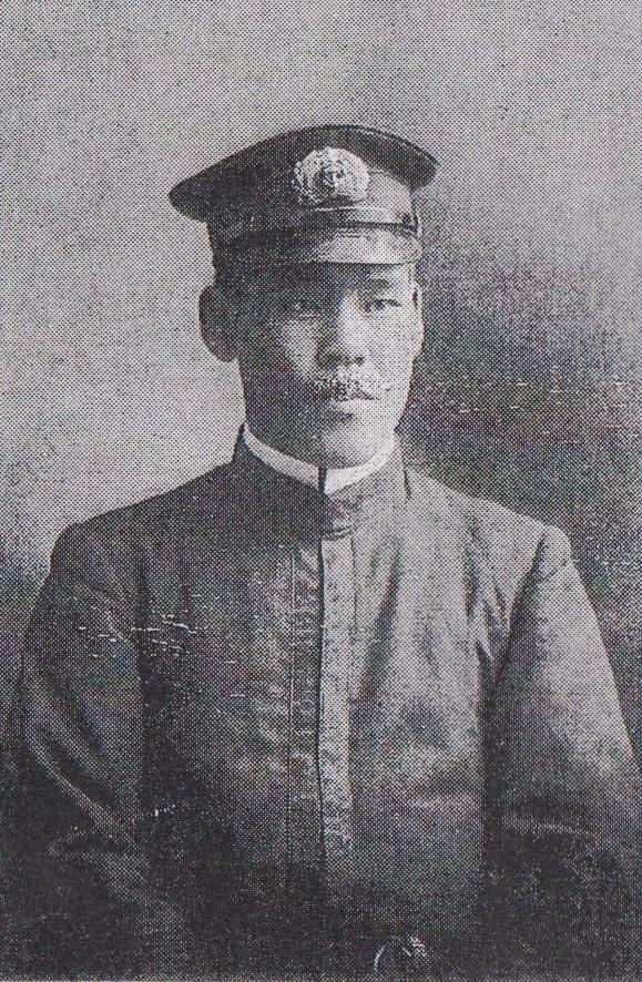 海軍兵学校時代の永野修身